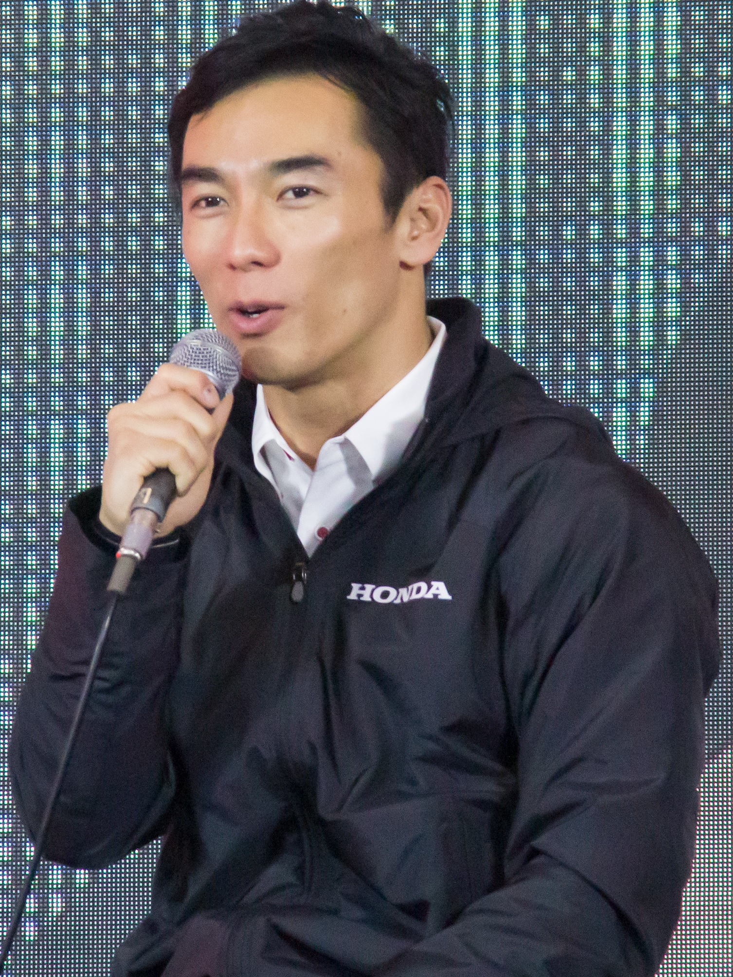 佐藤琢磨（東京オートサロン2019にて）